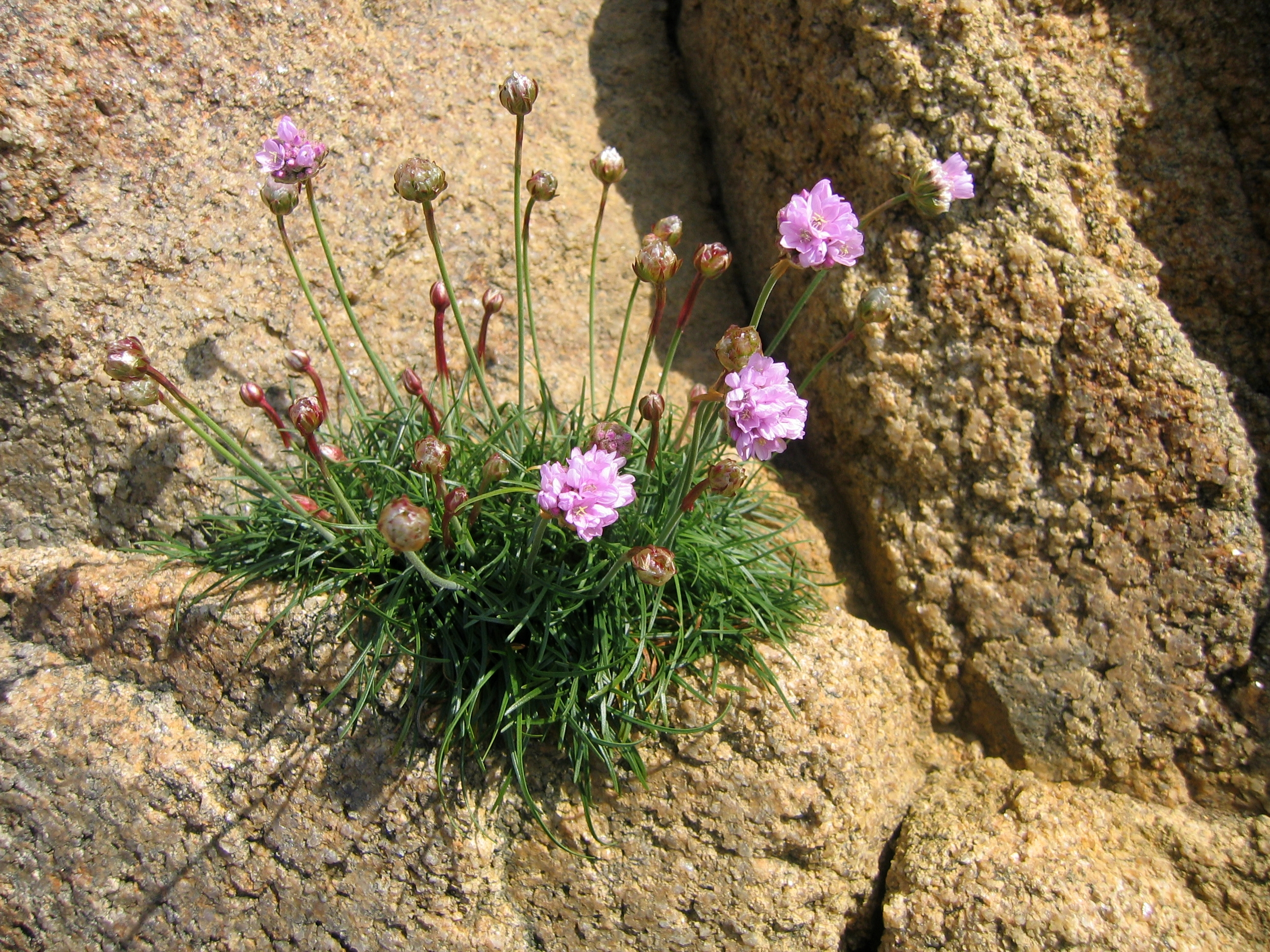 Armérie maritime à Carantec